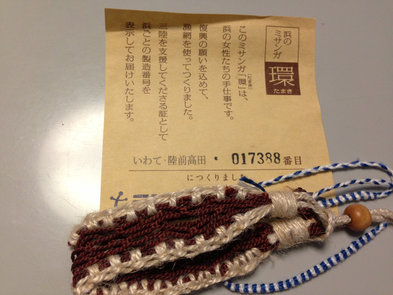 Misanga (Hama no Misanga "Tamaki")